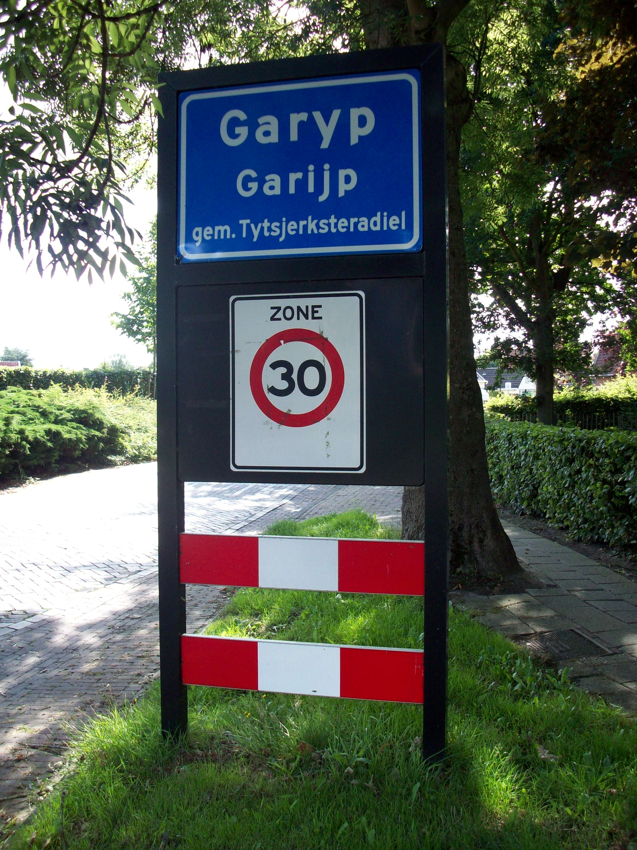 Garijp